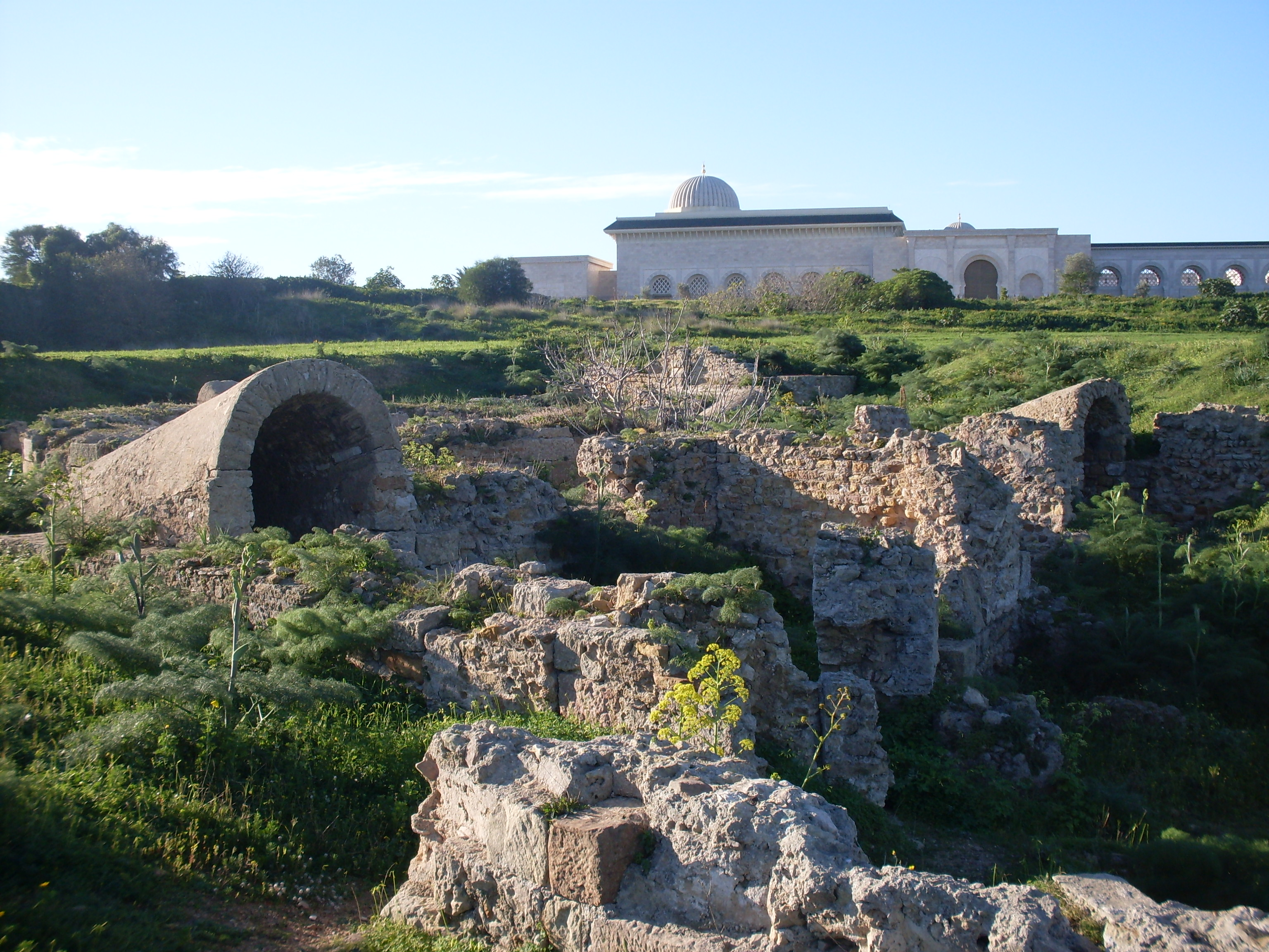 Carthage, entrées de la rotonde de Damous el Karita